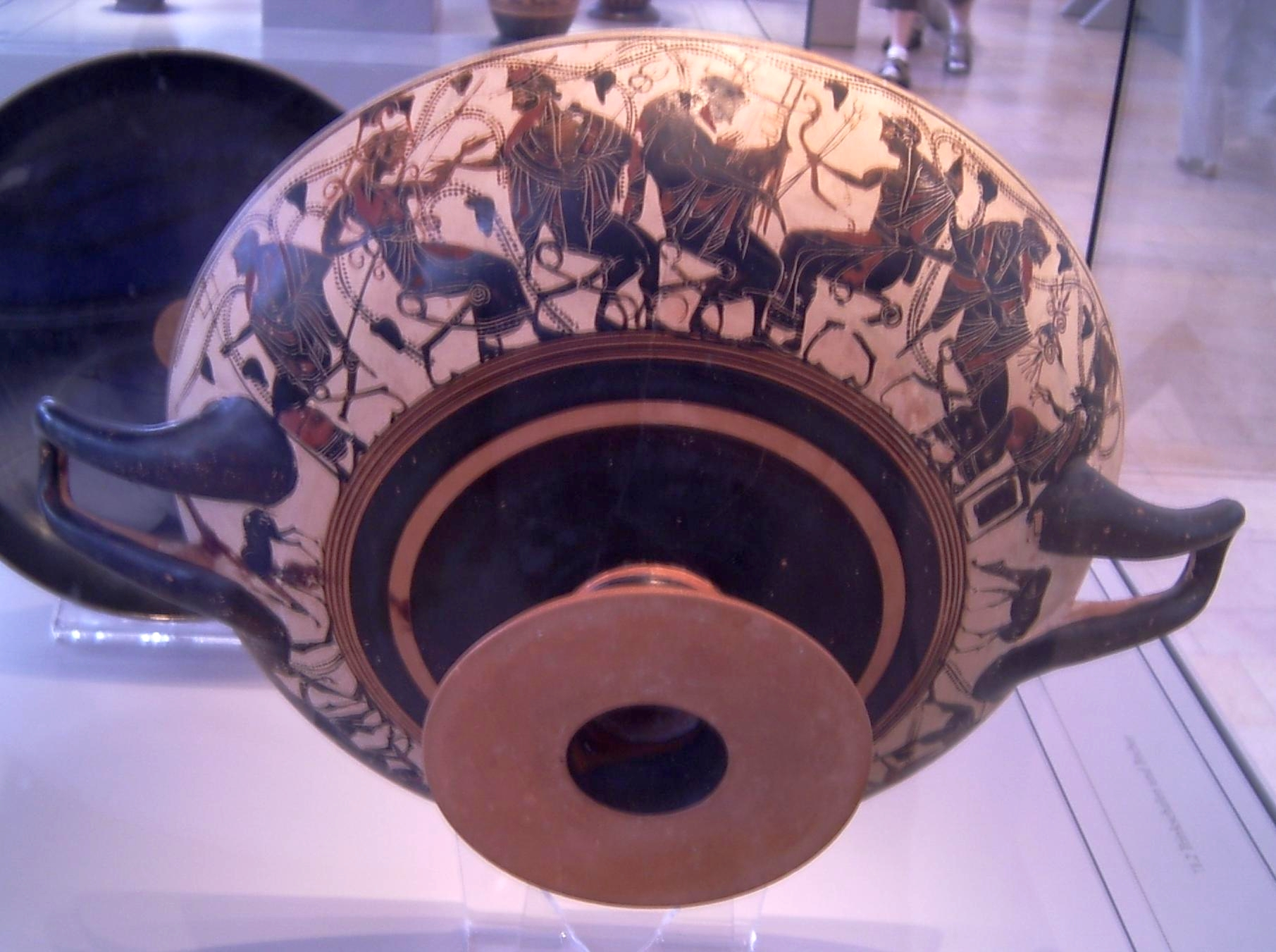 Nikosthenische Kylix, um 510-500 v. Chr., gefunden in Tarquinia.